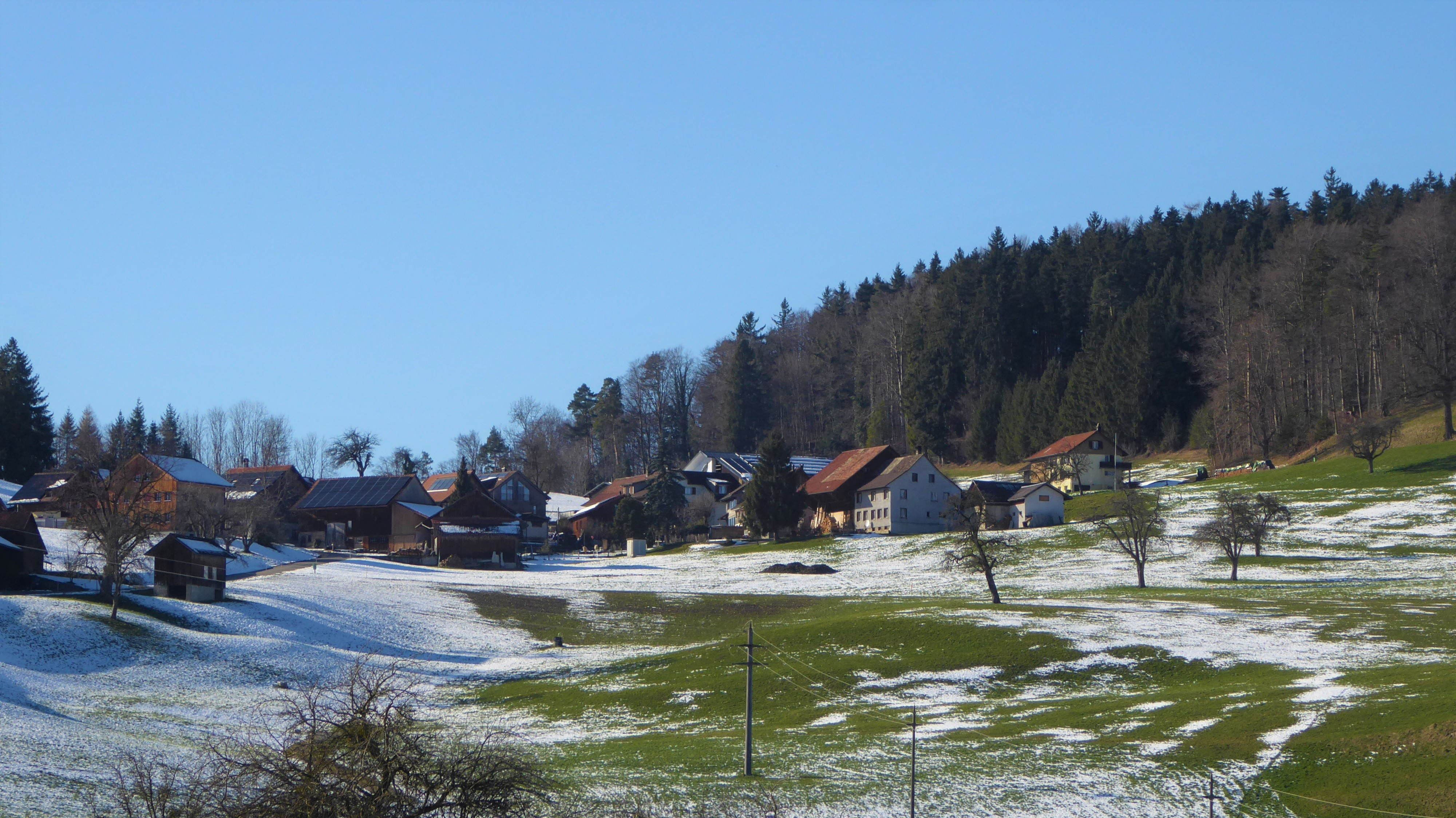 Bernhardsriet, auf Landkarte Bäritsriet geschrieben